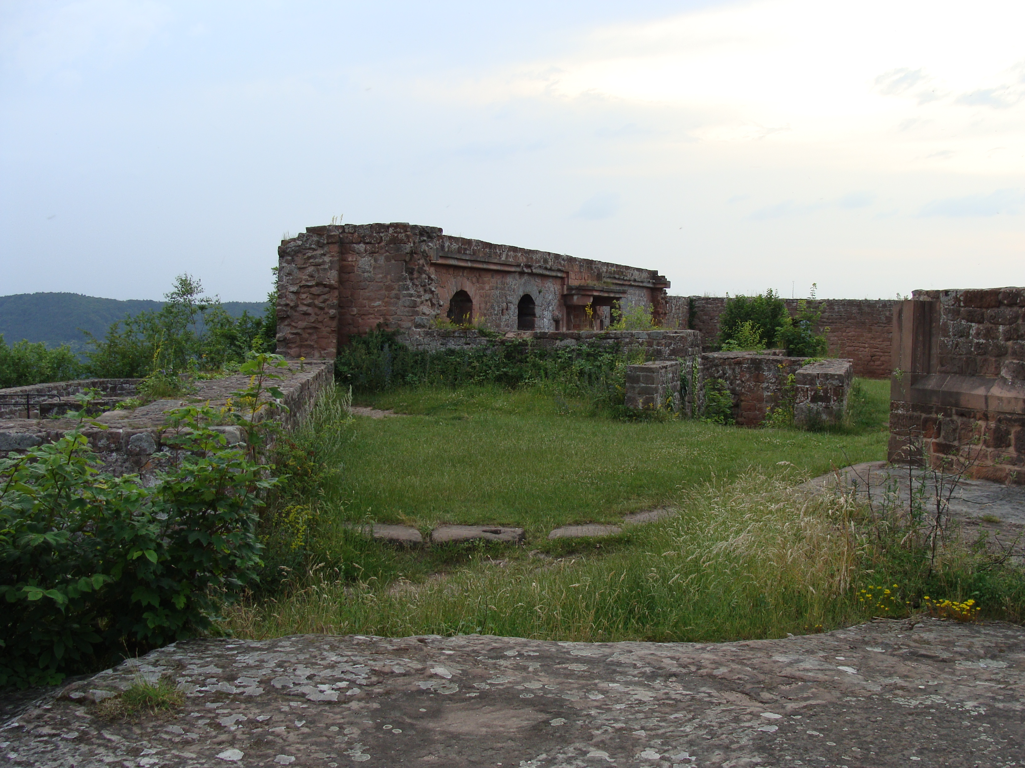 Burgruine Lindelbrunn im Wasgau (Pfälzerwald)